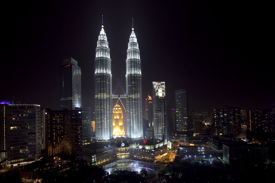 Kuala Lumpur, Malaysia